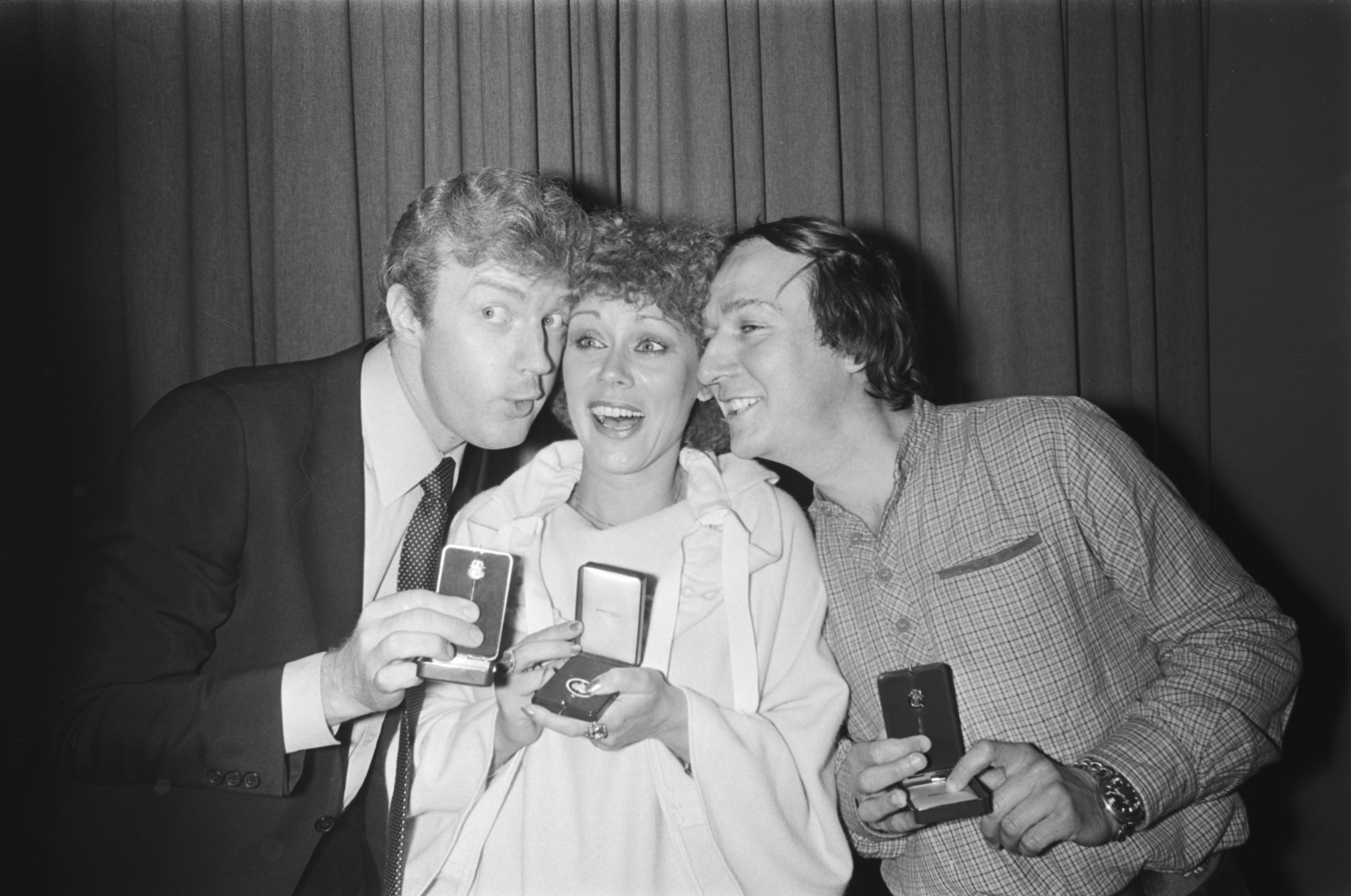 Collectie / Archief : Fotocollectie Anefo Reportage / Serie : [ onbekend ] Beschrijving : Gouden Harpen (Conamus) uitgereikt aan v.l.n.r. André van Duin, Connie Vandenbosch en Peter Koelewijn Datum : 17 oktober 1977 Trefwoorden : artiesten, musici, muziek, prijzen, zangeressen Persoonsnaam : Duin, André van, Koelewijn, Peter, Vandenbosch, Connie Fotograaf : Bogaerts, Rob / Anefo Auteursrechthebbende : Nationaal Archief Materiaalsoort : Negatief (zwart/wit) Nummer archiefinventaris : bekijk toegang 2.24.01.05 Bestanddeelnummer : 929-3940